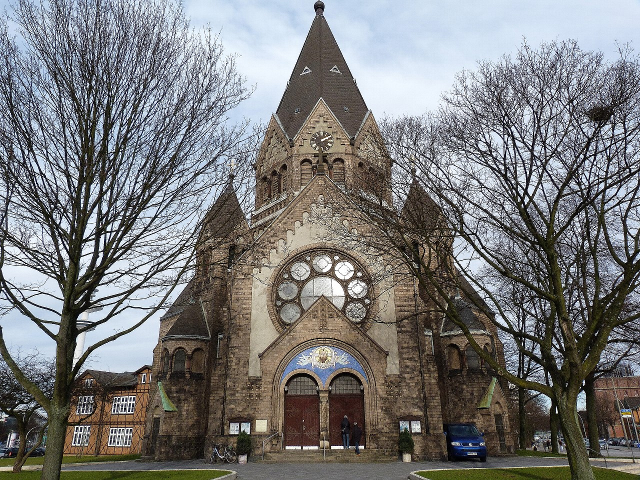 Die Gnadenkirche in Hamburg-St.Pauli